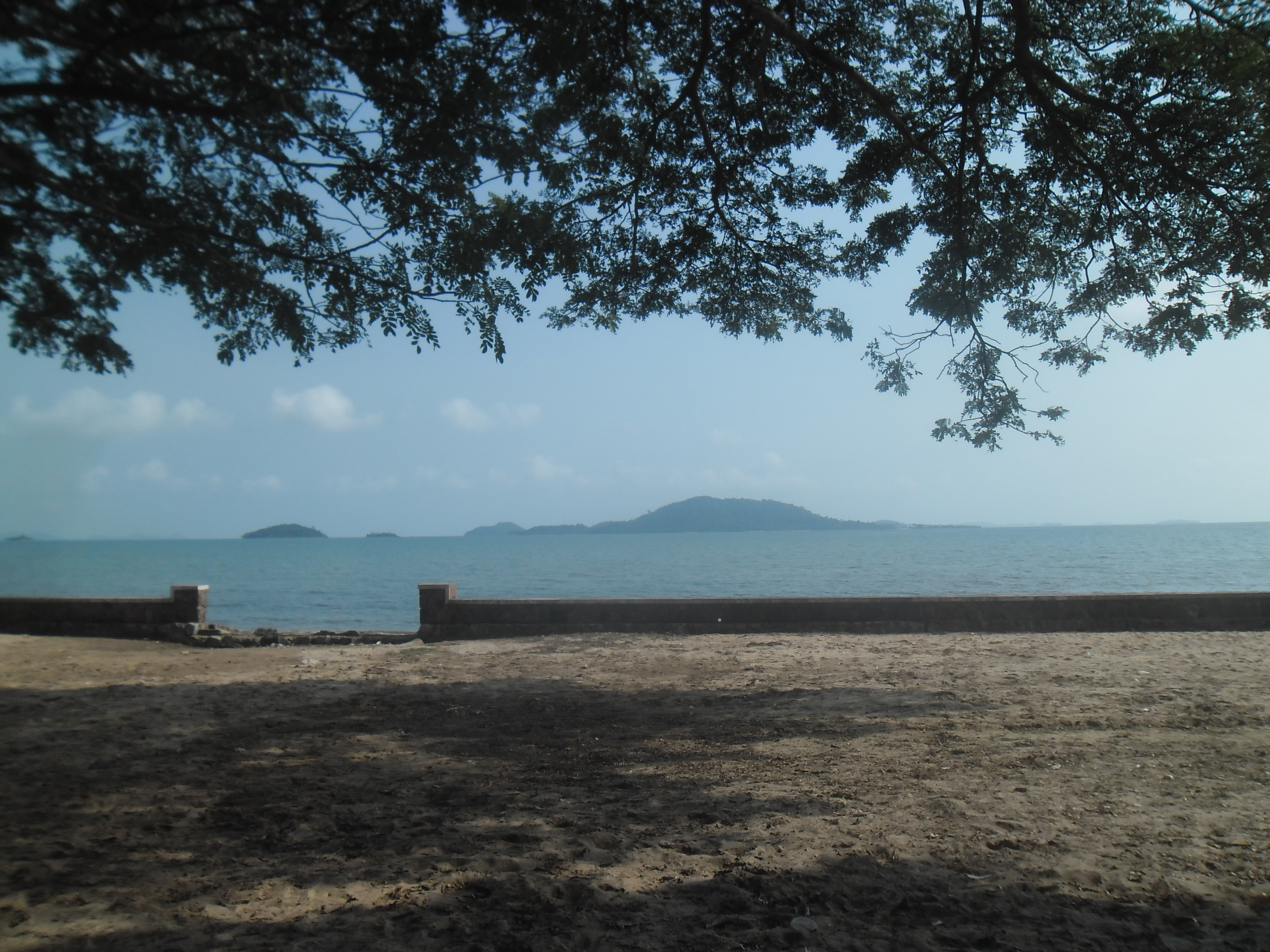 Kep, Kambodža